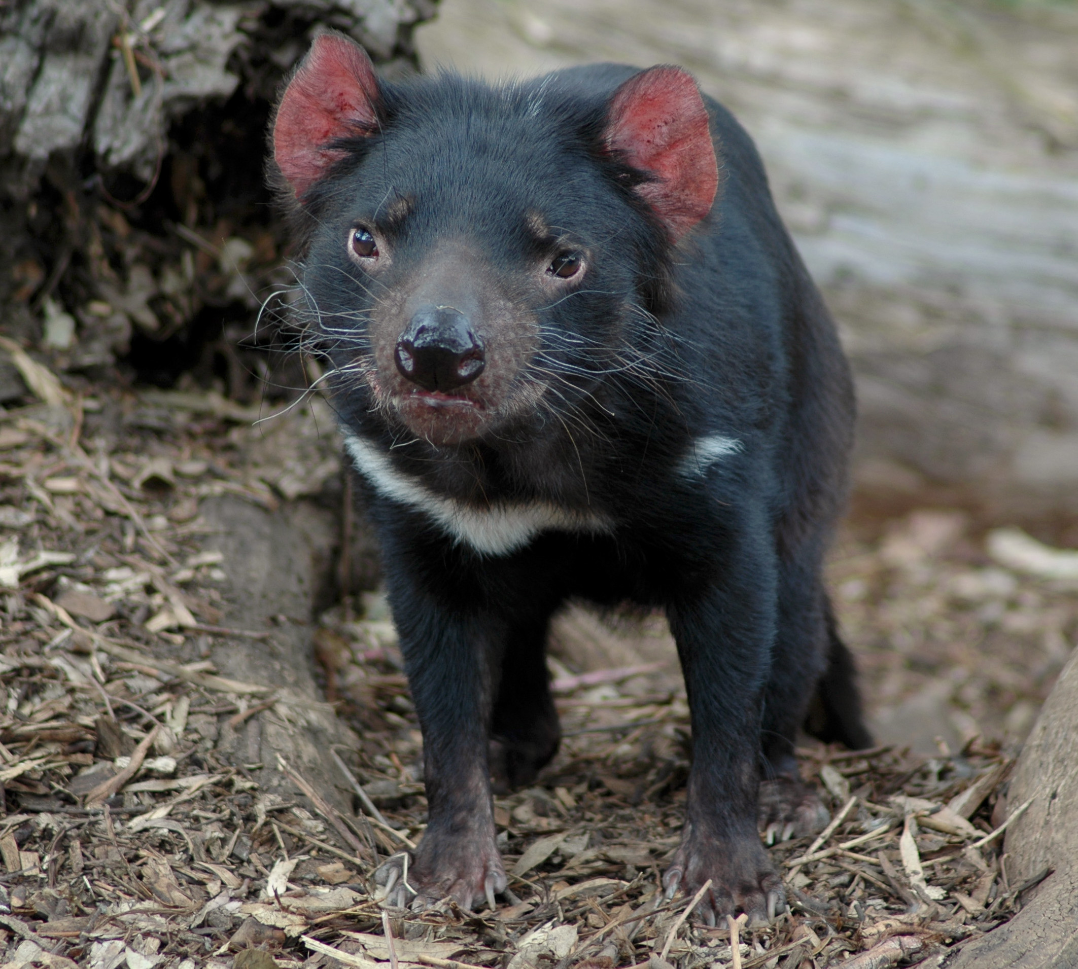 Young Tasmanian devil